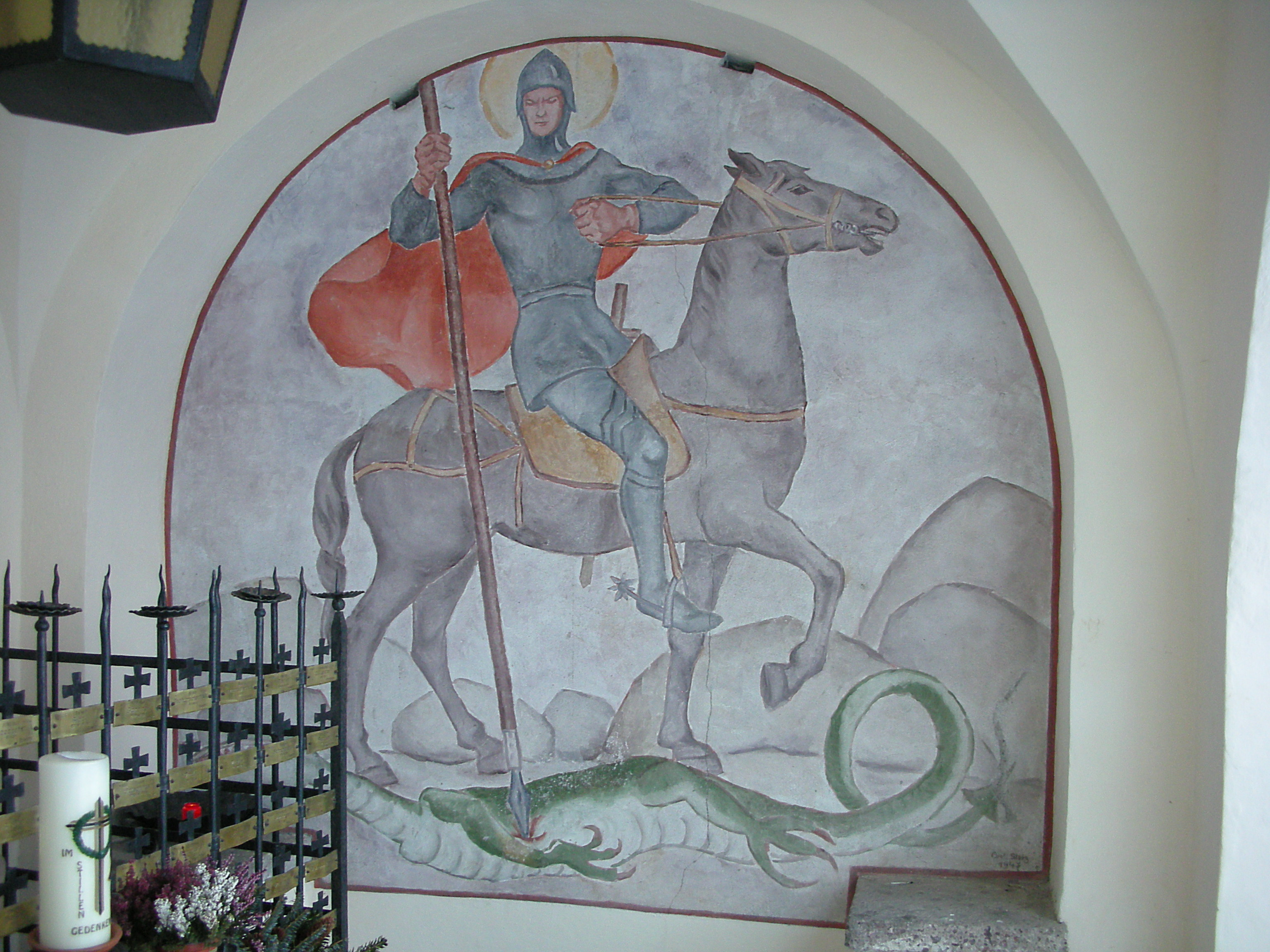 Der Drachentöter. Fresko (1947) von Gretl Stolz auf dem öffentlich zugänglichen Friedhof von Sexten (Südtirol)